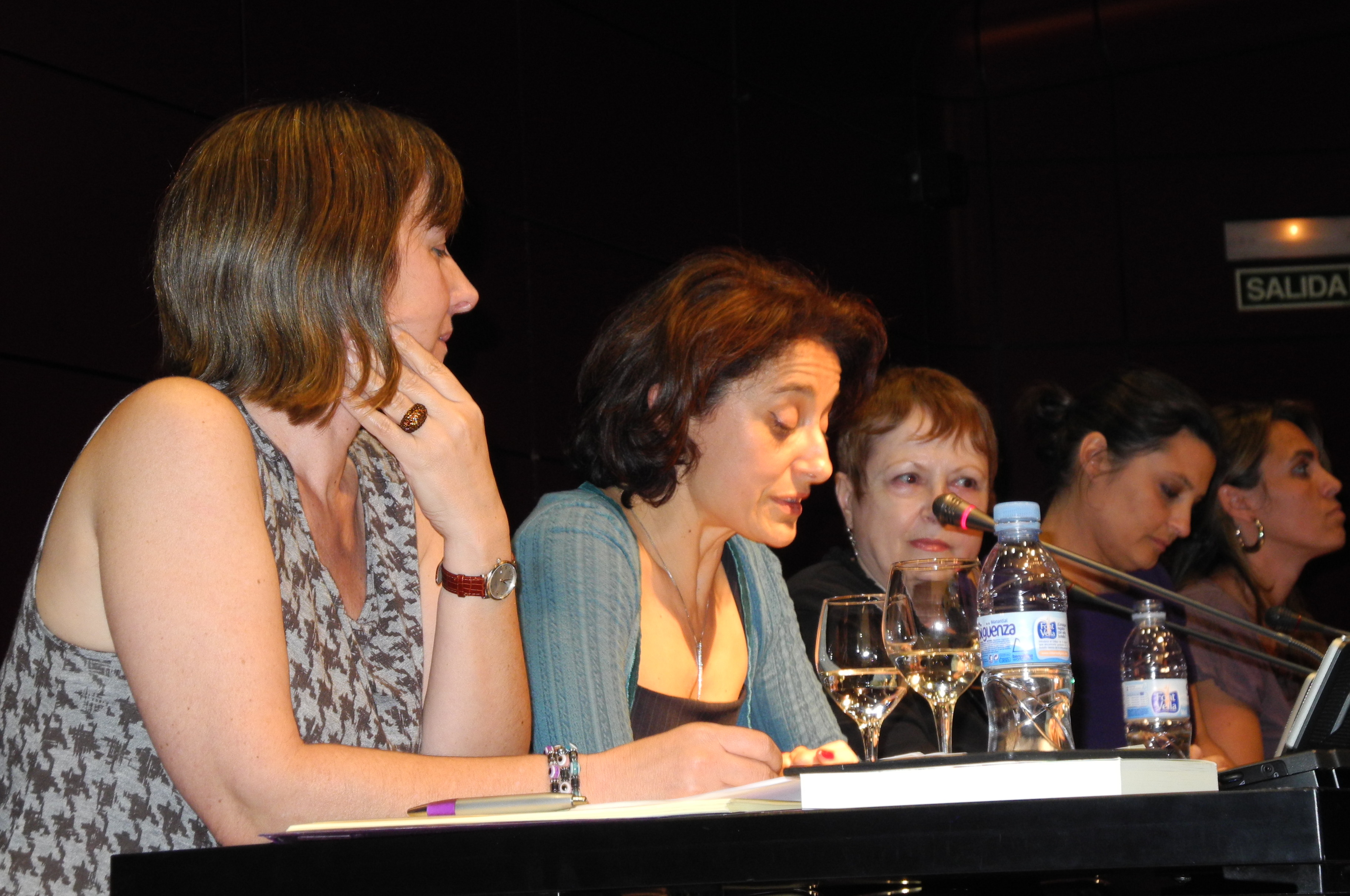 Mesa de apertura de la celebración del 20 aniversario del Curso de Teoría Feminista dirigido por Celia Amorós y Ana de Miguel. Madrid. Intervención de Marian López Fernández Cao